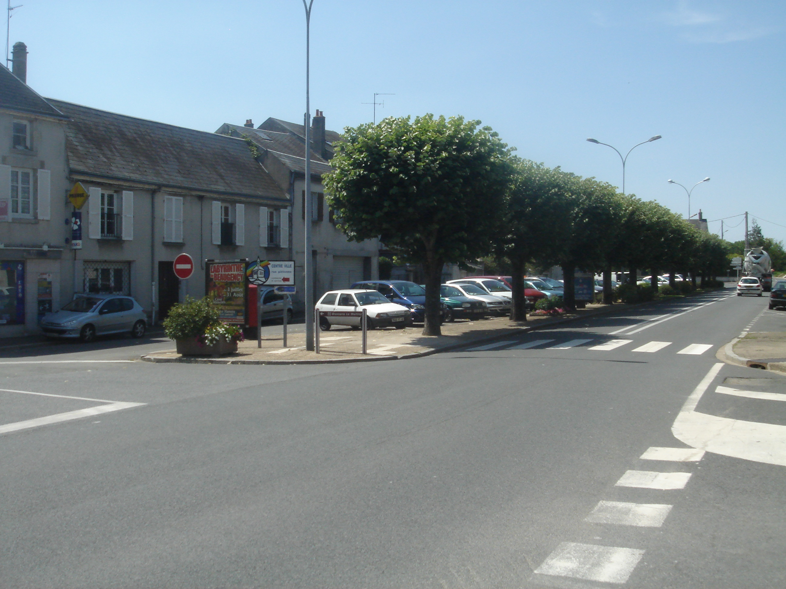 Boulevard Jeanne d'Arc, Jargeau, Loiret, France